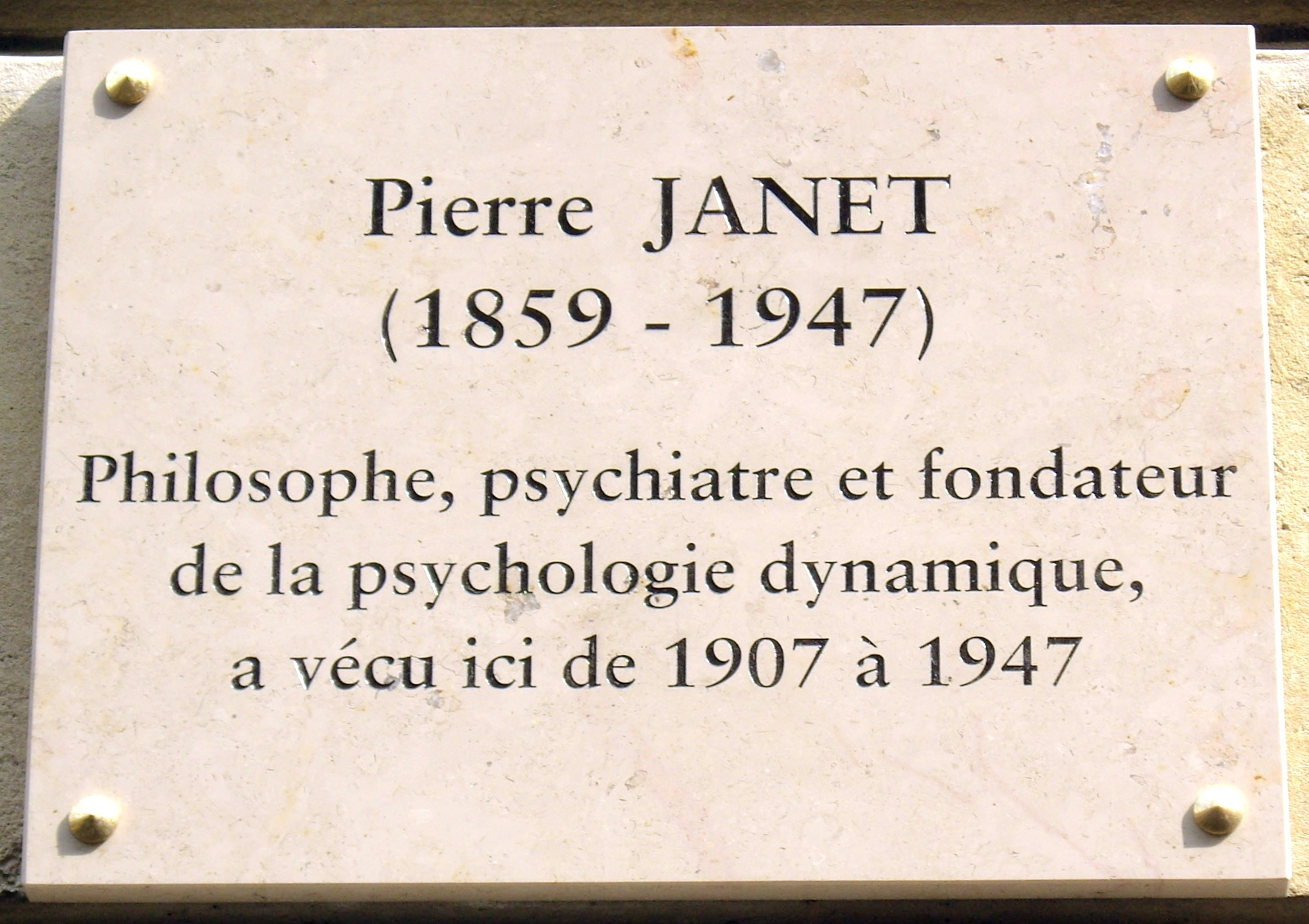 Plaque apposée au n° 54 de la rue de Varenne, Paris 7e, où habita le philosophe et psychologue Pierre Janet (1859-1947) de 1907 à 1947.